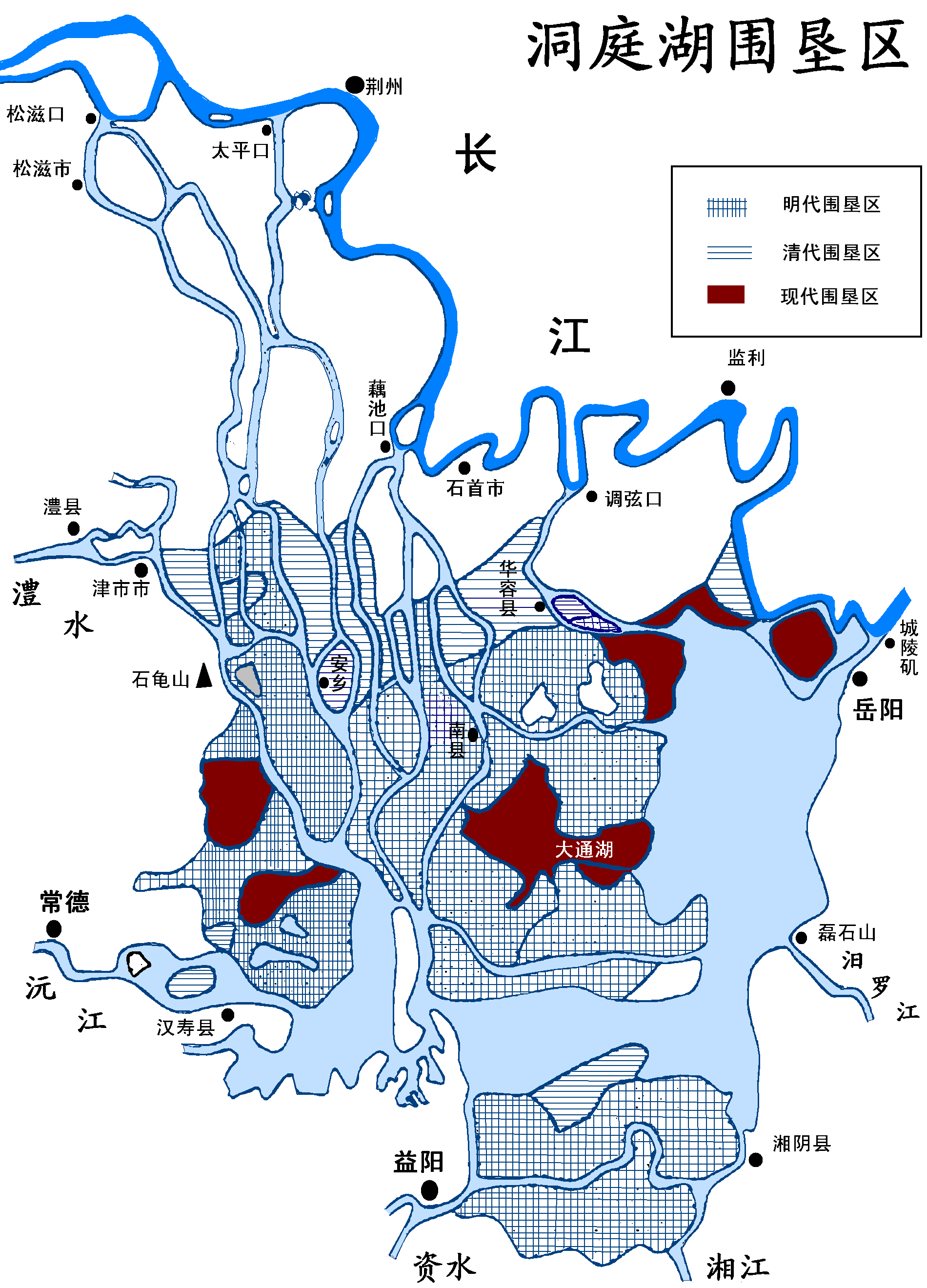 Lake Dongting；洞庭湖区